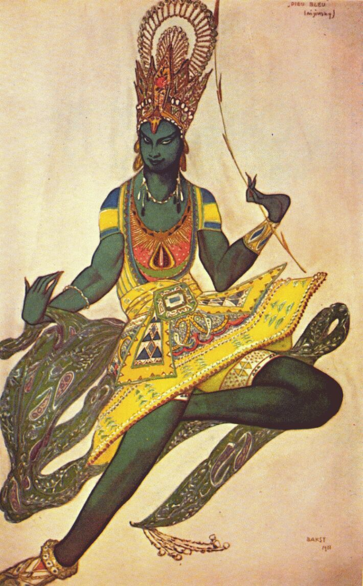 Эскиз костюма Синего бога для постановки *Синий бог* Райнальдо Гана. 1912 le dieu bleu nijinsky in title role